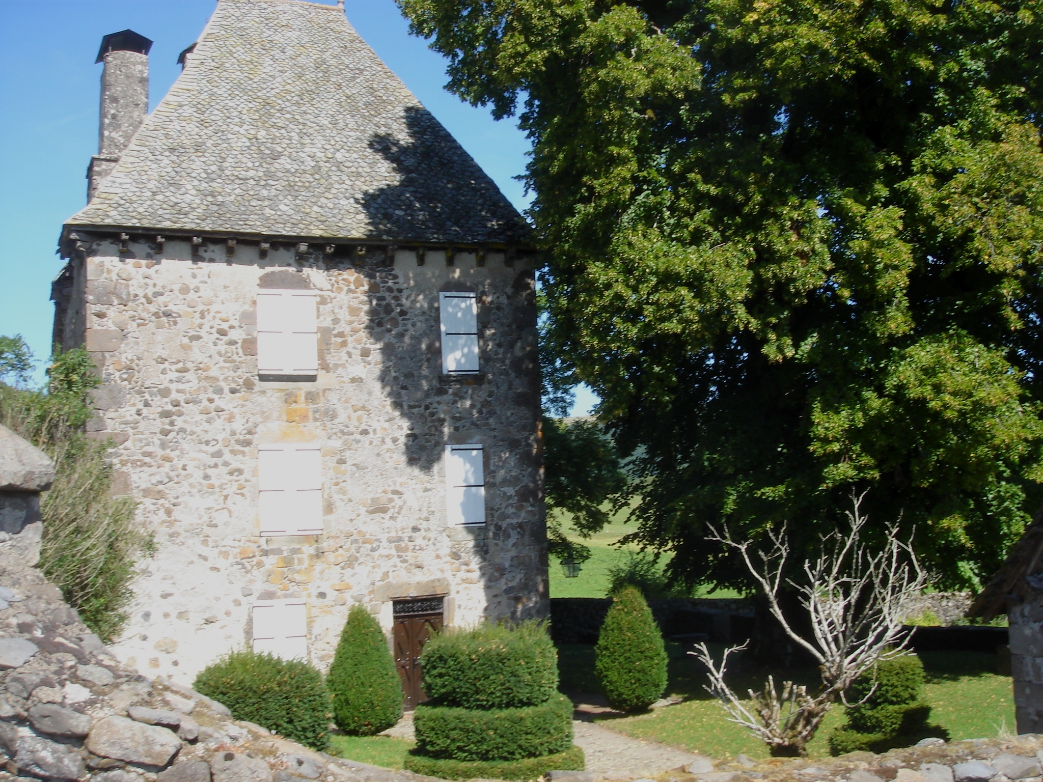 Manoir de Falhiès à Giou de Mamou (15)